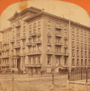 Barnum's Hotel, Baltimore (detail)